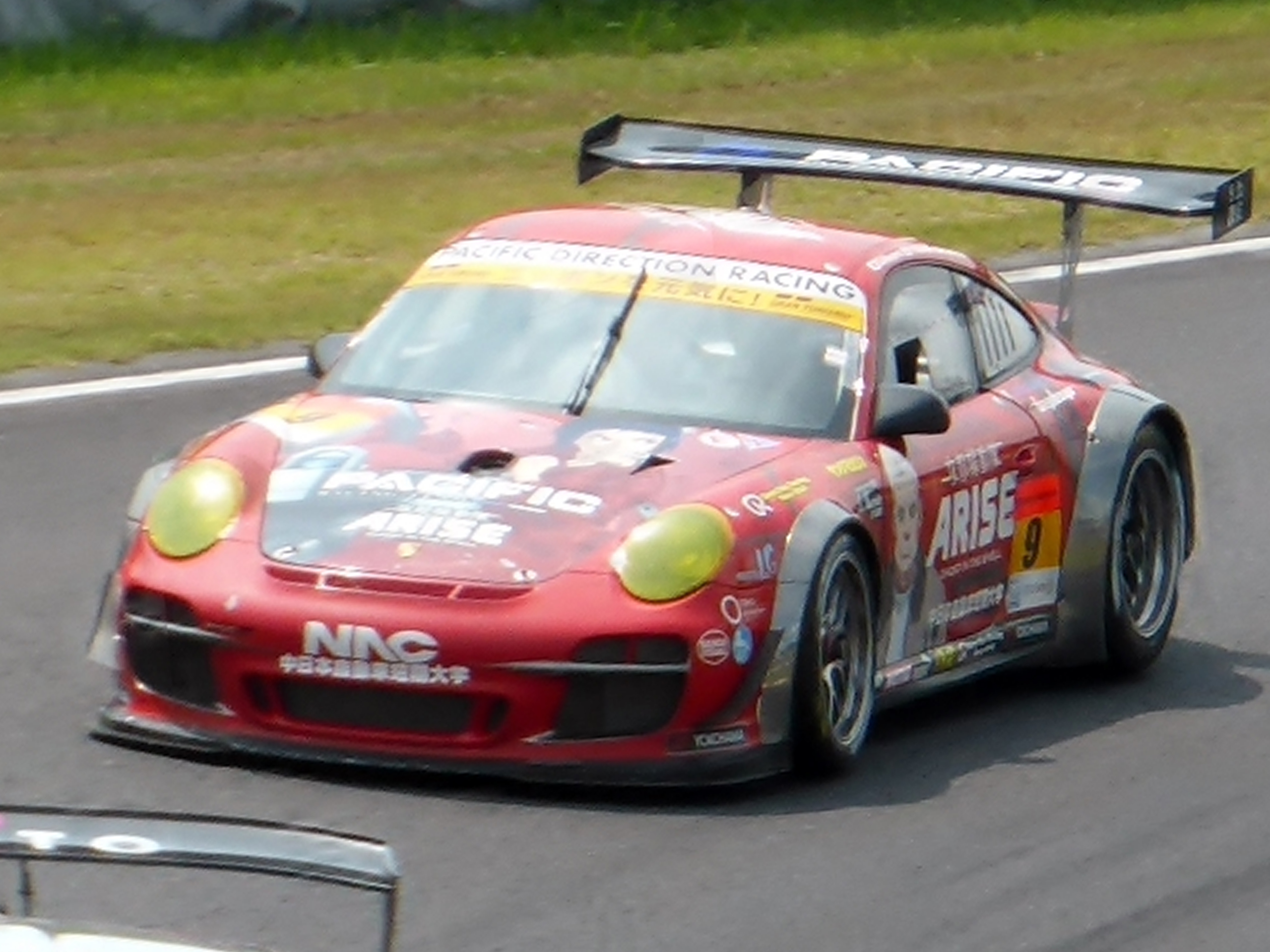 2013年ポッカサッポロ1000㎞において9号車NAC攻殻機動隊ARISE DR ポルシェ を撮影。